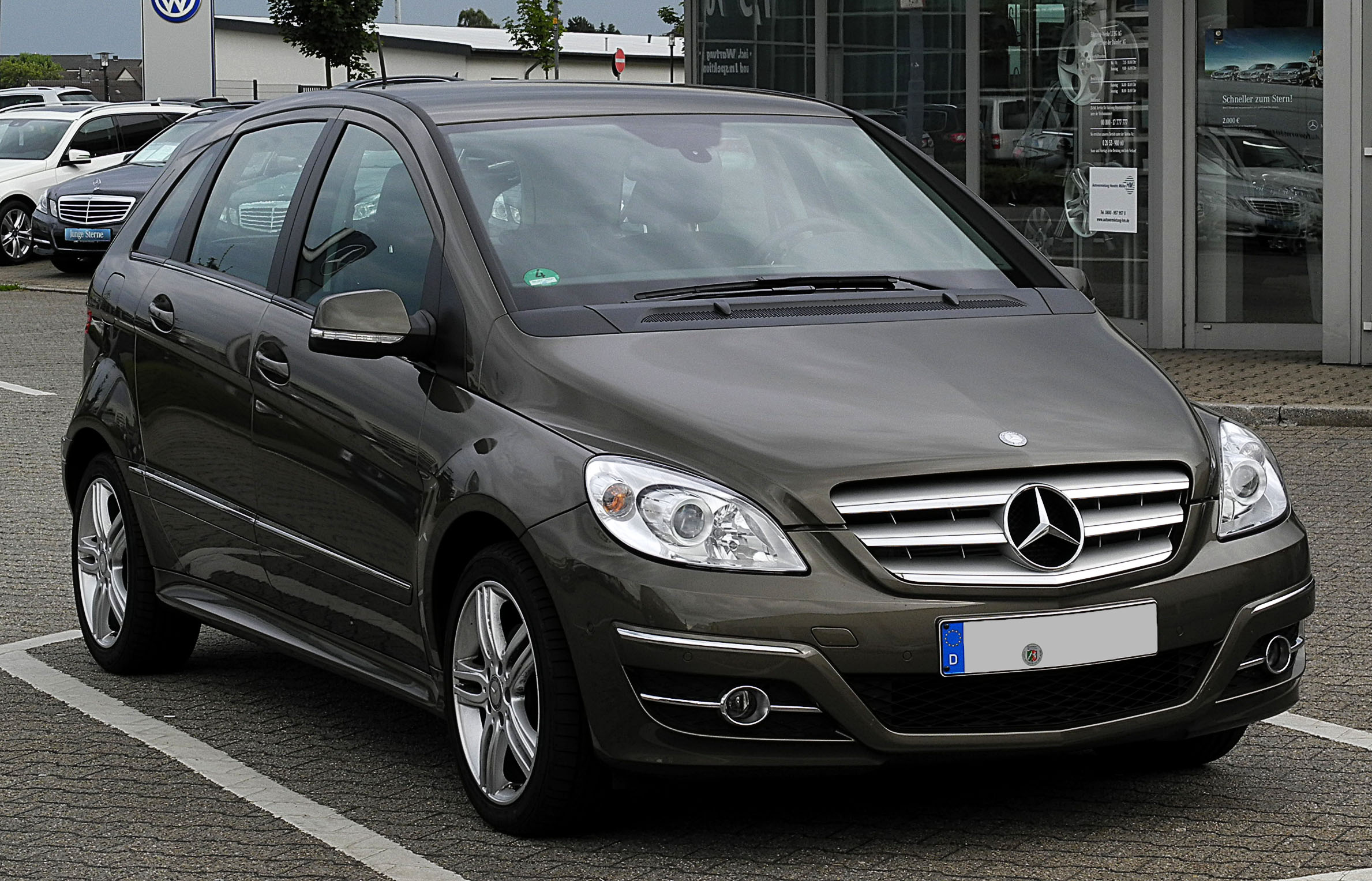 Mercedes-Benz B 180 CDI (T 245, Facelift)